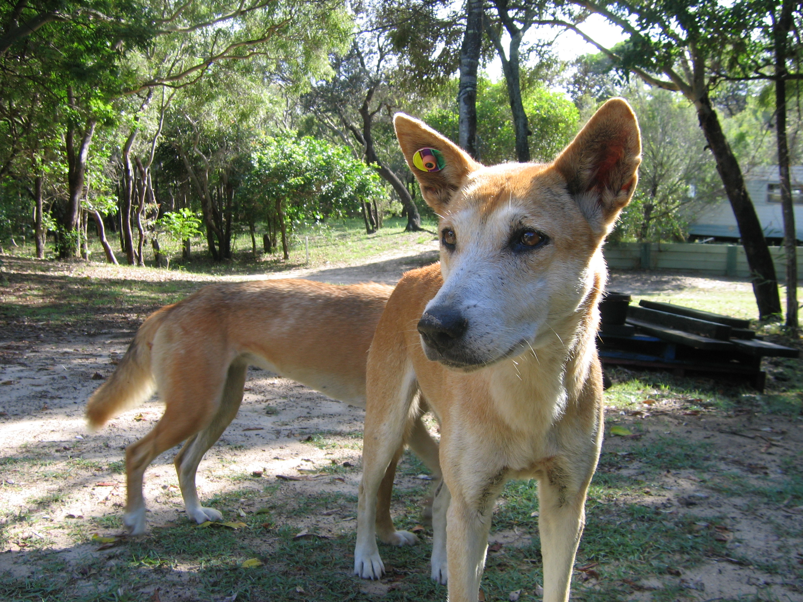 Dingoes at Fraser Island, Queensland, Australia